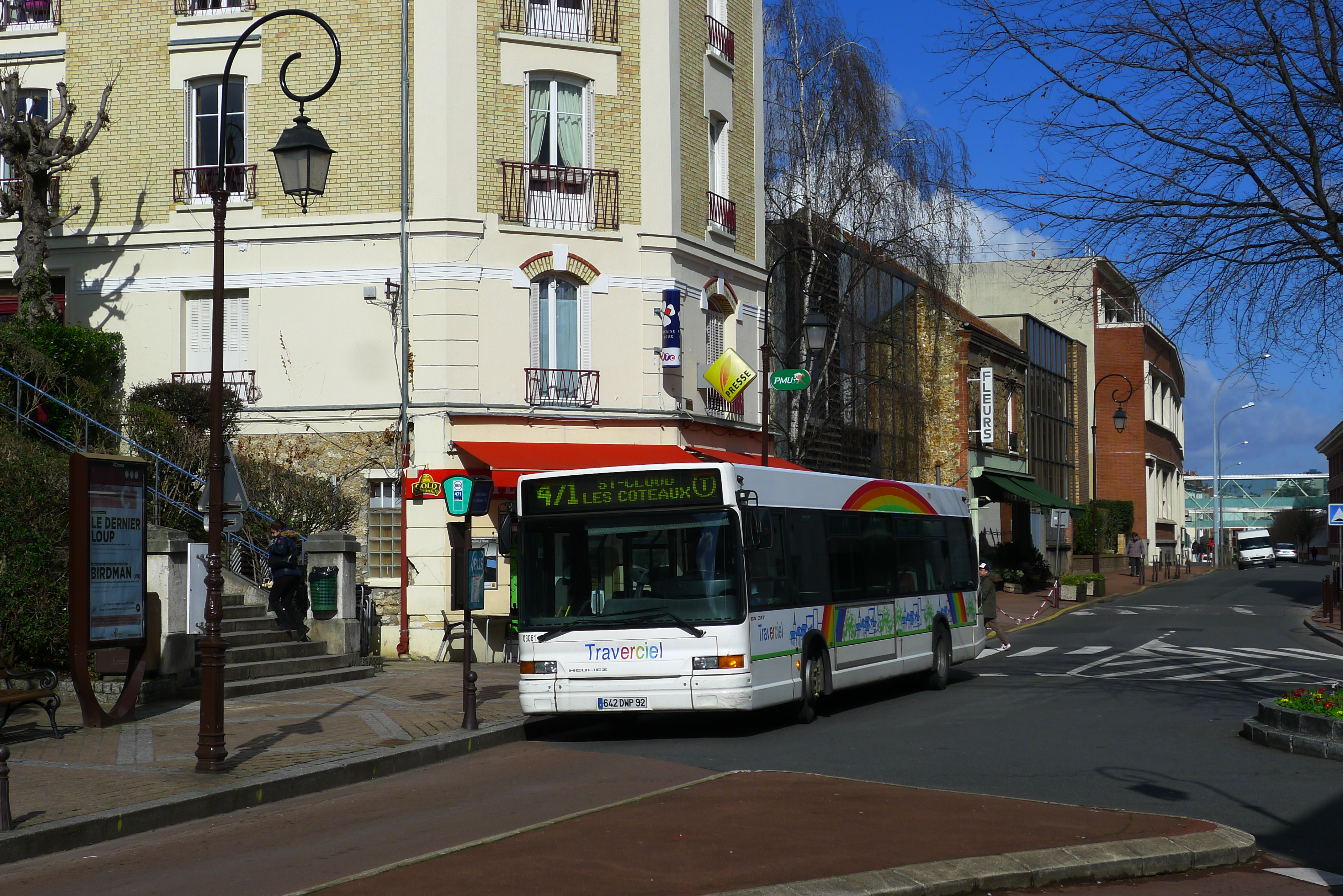 Autobus Heuliez GX317 du réseau Traverciel sur la ligne 471 arrivant à son terminus Les Coteaux (Saint-Cloud)